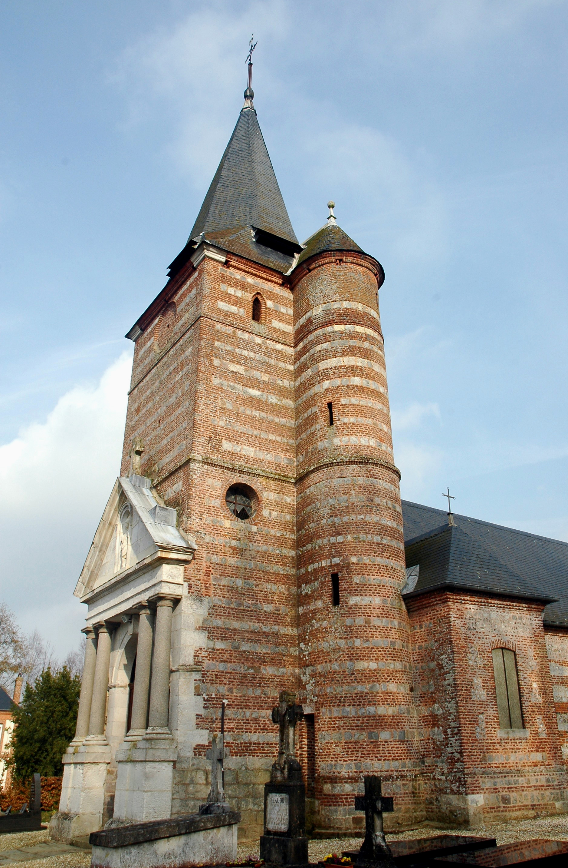 Veauville-lès-Quelles (Seine-Maritime, France). L'église Saint-Aignan.